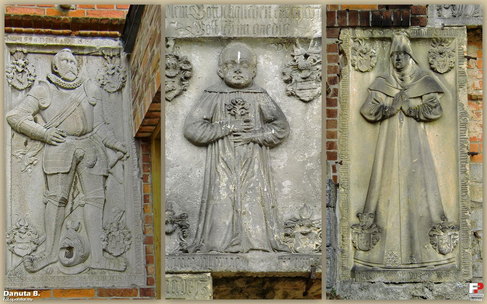 Takich epitafiów tam sporo. Żeby nie zanudzać pokazuję od razu trzy:). Tablica z lewej została częściowo przesłonięta przez ścianę dobudowanego wtórnie ganka.